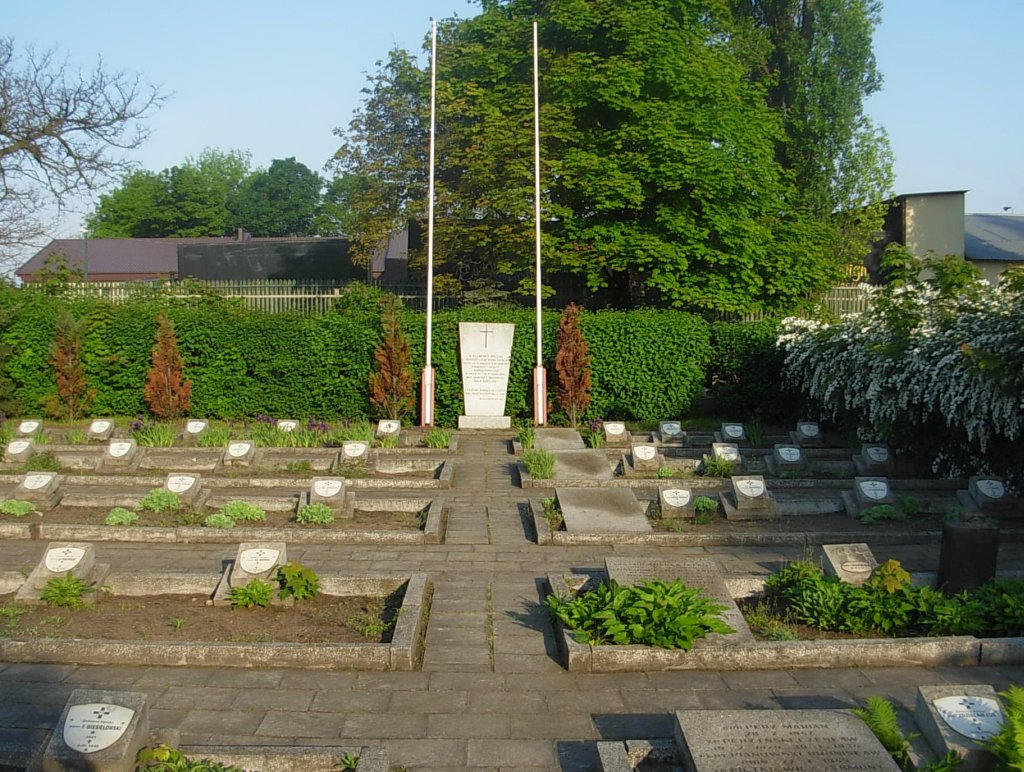 Cmentarz komunalny, Bydgoszcz ul Rynkowska. Kwatera wojenna